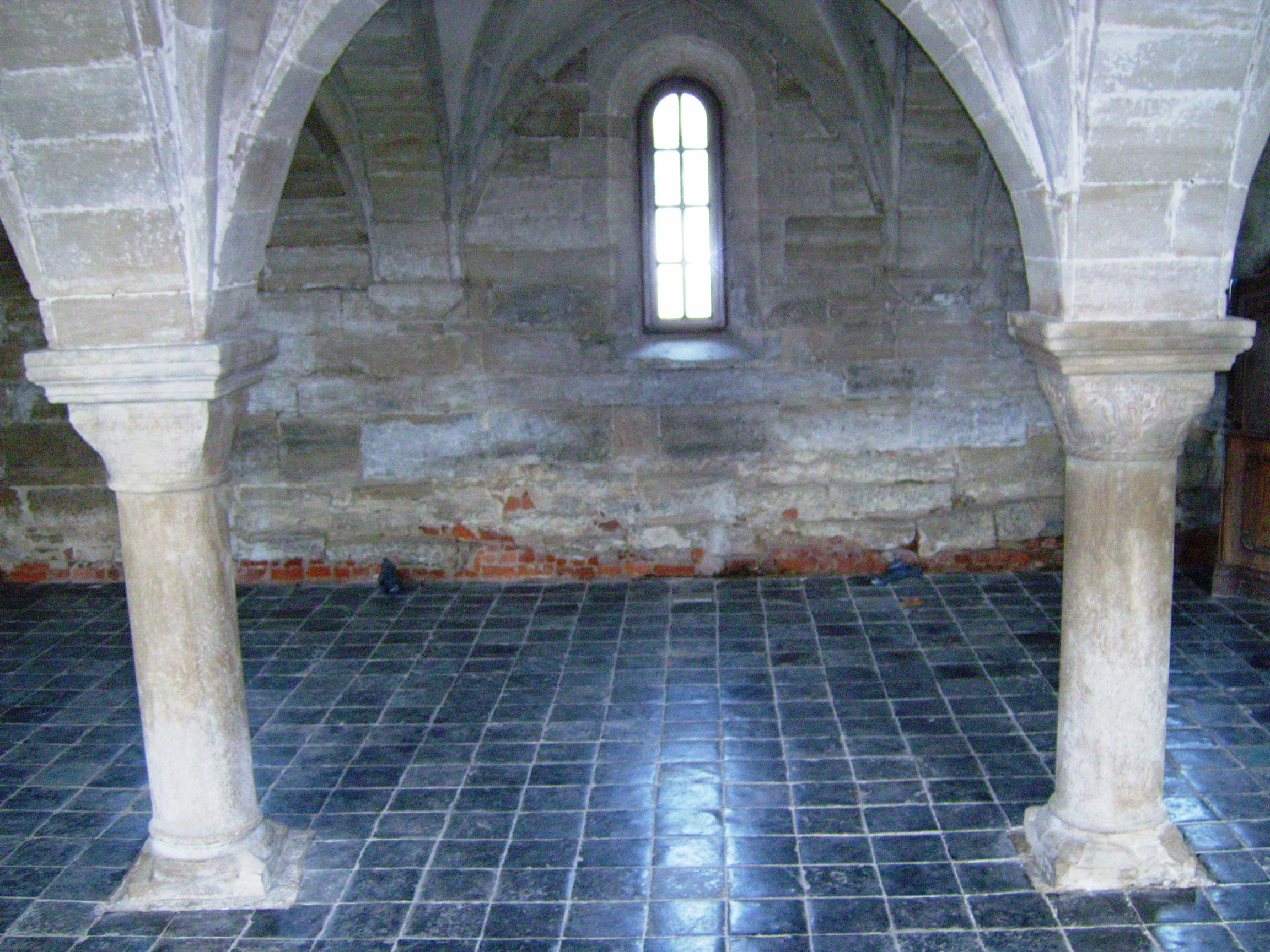 Kapitularz.